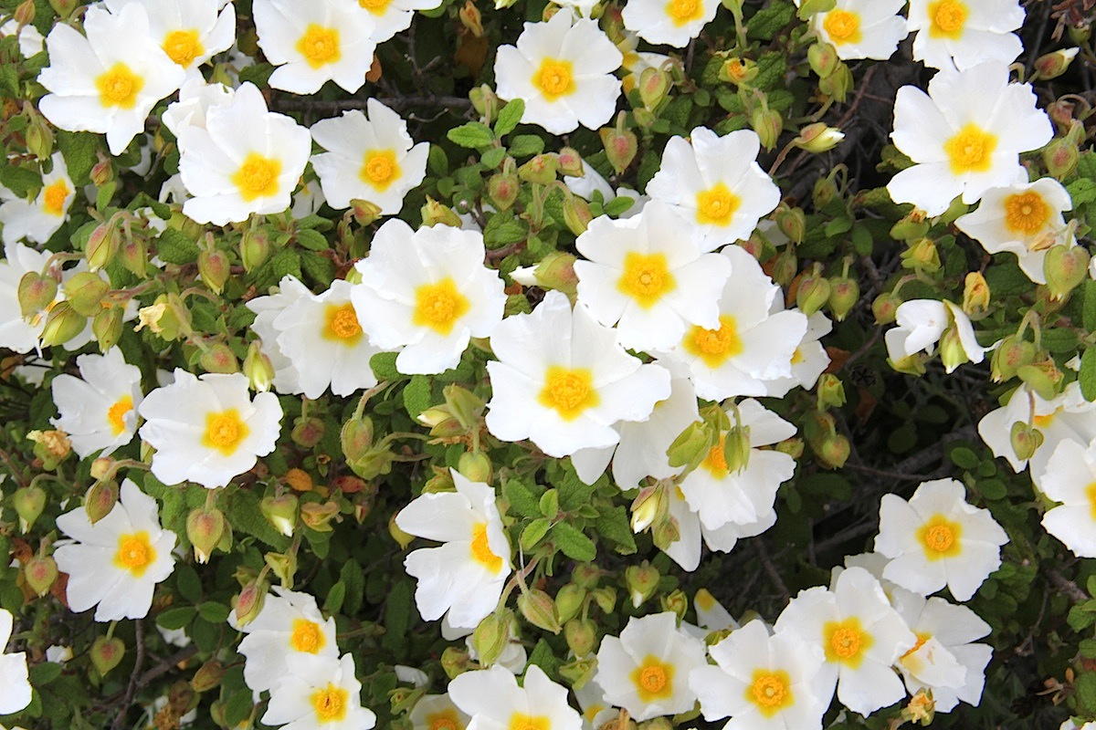 Cistus salviifolius